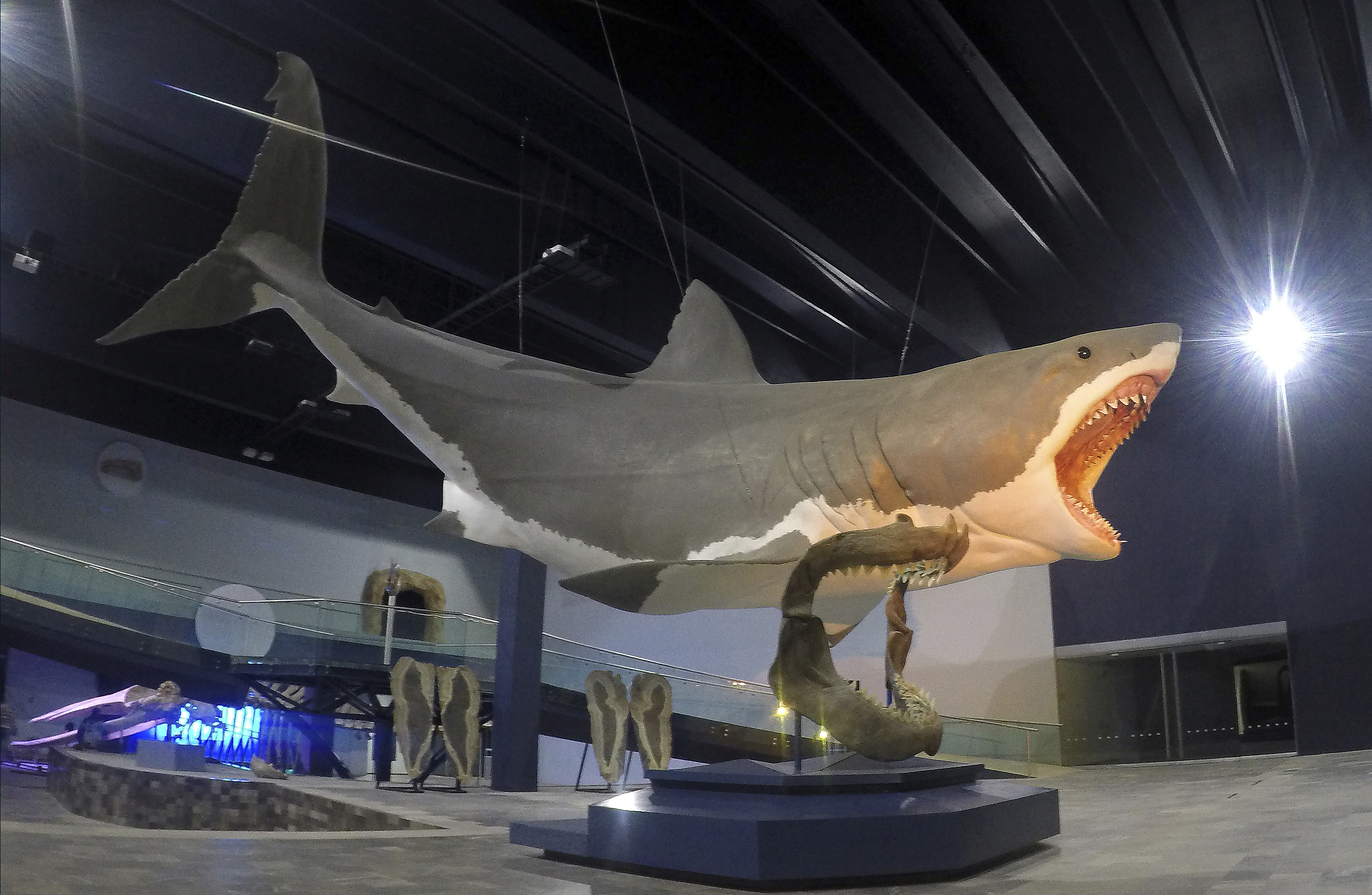 Representación artística de tiburón Megalodon de 16 metros de longitud en el Museo de la Evolución, Puebla, México. 16 meters long Megalodon representation in "Museo de la Evolucion", Puebla, Mexico